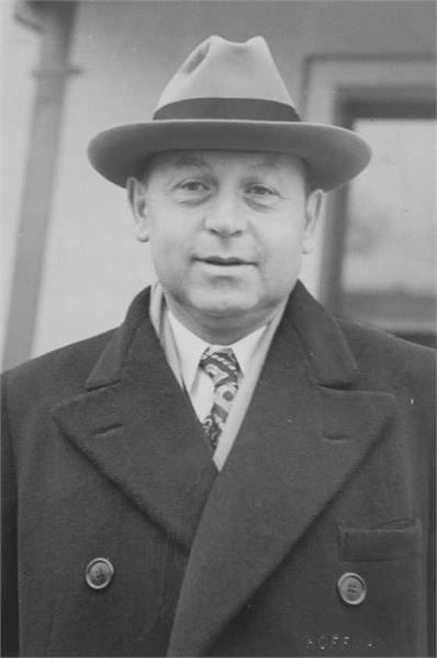 ירושלים - מר ישראל גולדשטיין